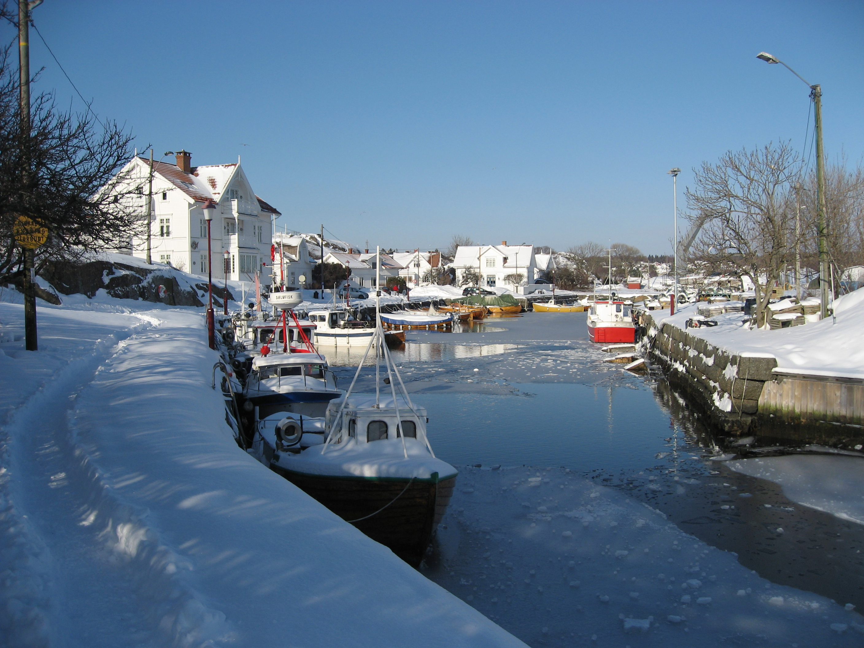 Brygga i Nevlunghavn, Norge Keywords: Boats and ships, Fisheries, Sea and water, Ice and snow, Norway